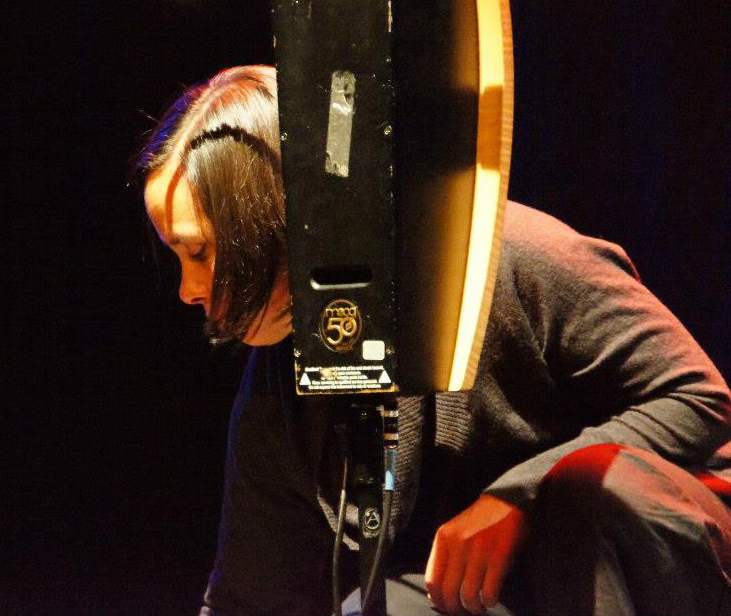 Vienna - Pamelia Kurstin, adjusting her 'Theremin'